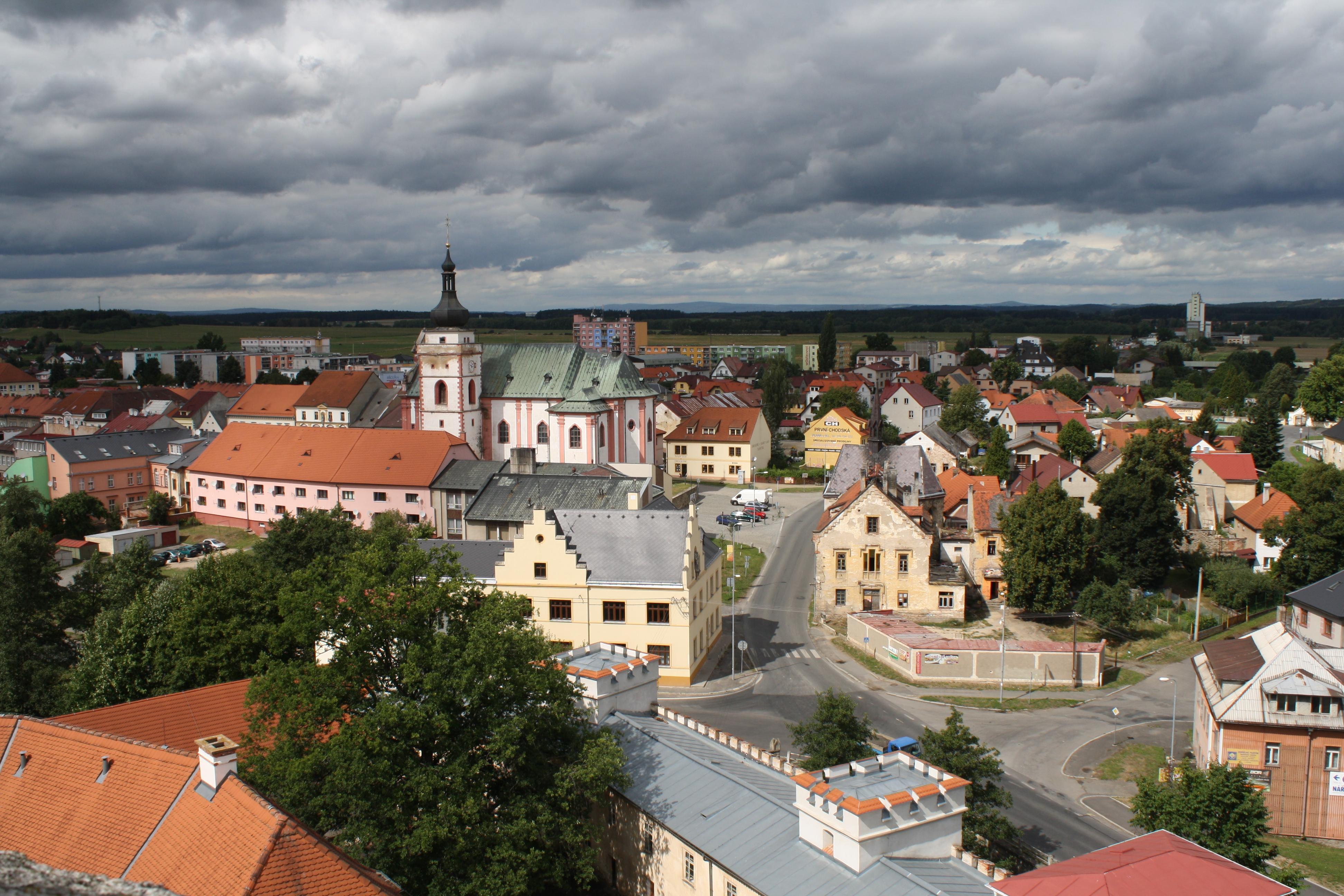 Bor (Tachov District) (deutsch: Haid Bezirk Tachau)